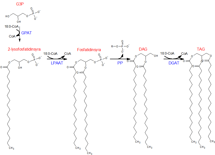 Kannedysyntesvägens produktion av TAG från G3P och tre 18:0-CoA fettsyremolekyler. Den bildade triacylglyceriden kallas för glycerylstearat (stearin) då den består av tre stycken stearinsyror.